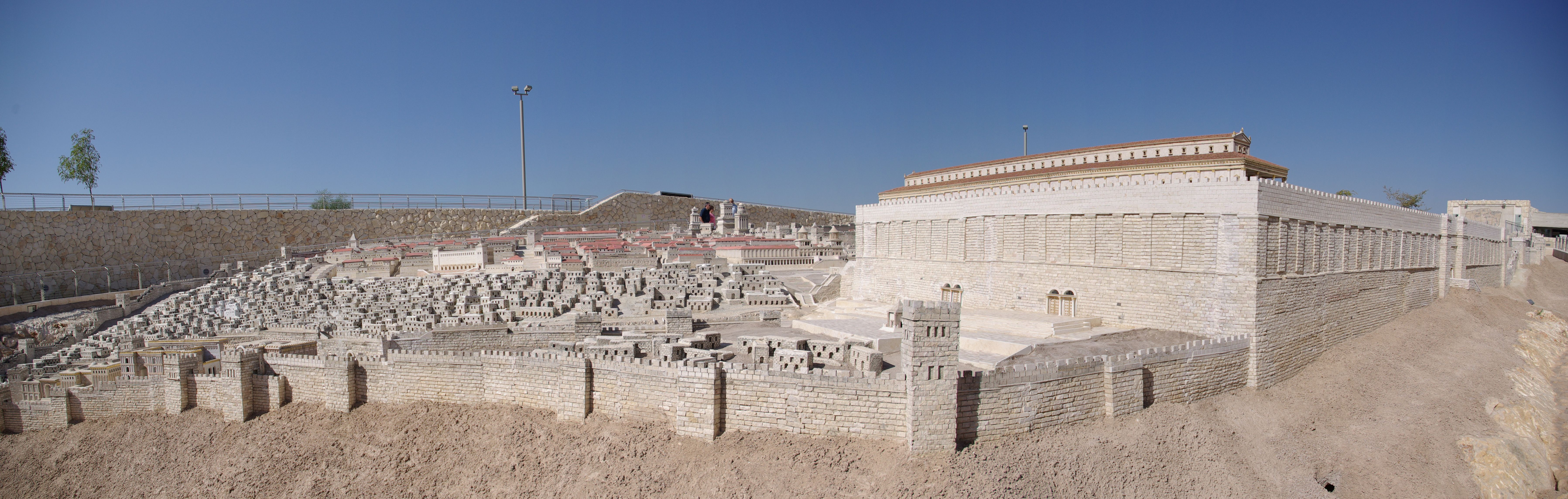 Jerusalem Modell